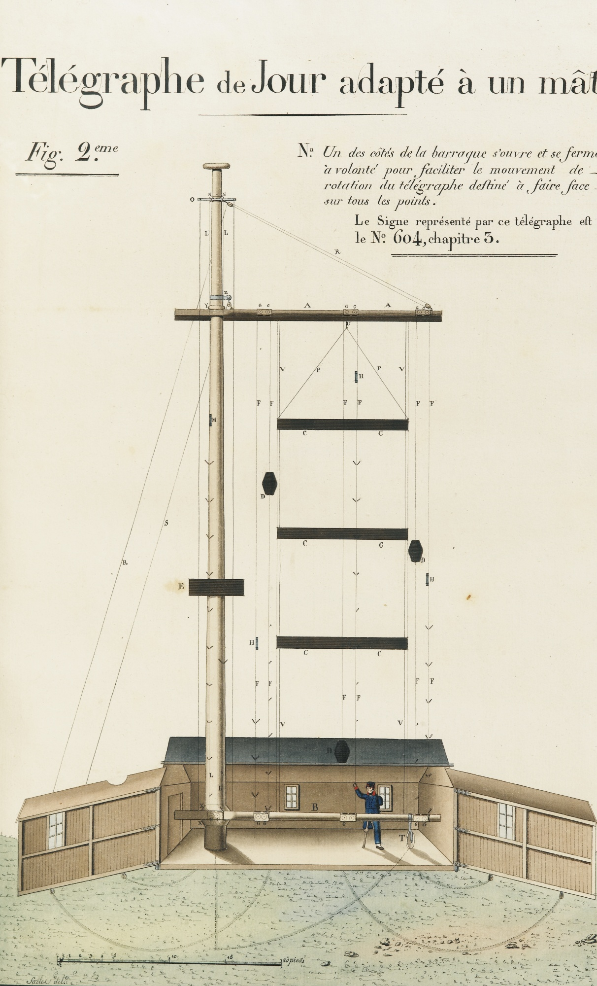 La machine était composée d'un mât qui s'élevait de 20 à 30 pieds ; au bout de ce mât était une vergue de 18 pieds placée en forme de croix ; on y avait suspendu par des cordes 3 globes d'osier... Un 4e globe était placé à 2 pieds au-dessus de la maisonnette. Le Contre-amiral forma des figures en hissant ces boules d'osier à des positions variées d'autant de manières qu'il voulait avoir de signaux. La même méthode fut employée pendant la nuit et les succès furent les mêmes ; pour cela l'auteur substitua des lanternes à ces globes